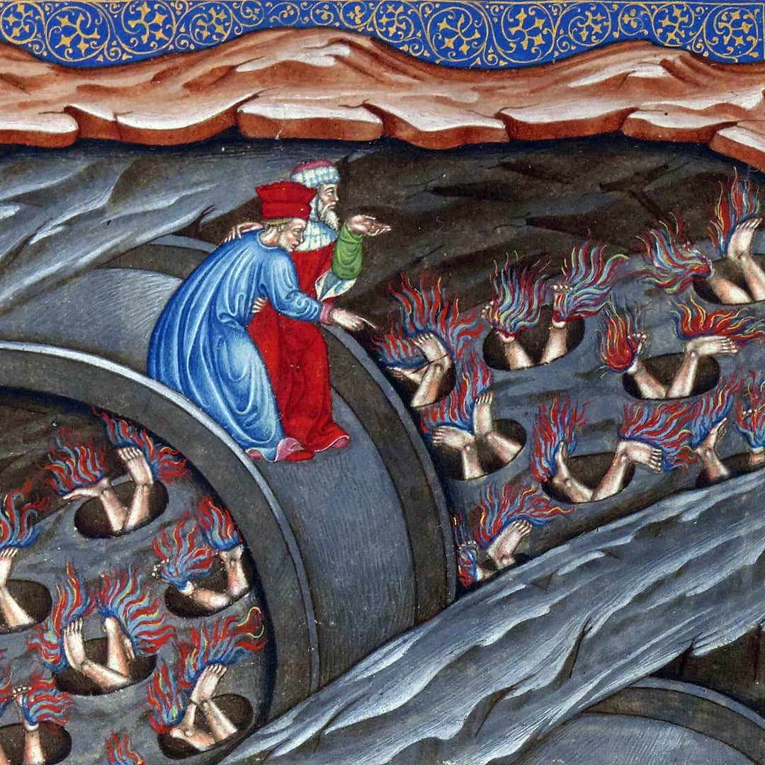 Los condenados por simonía en la obra de Dante. Miniatura lombarda C.1430-1450